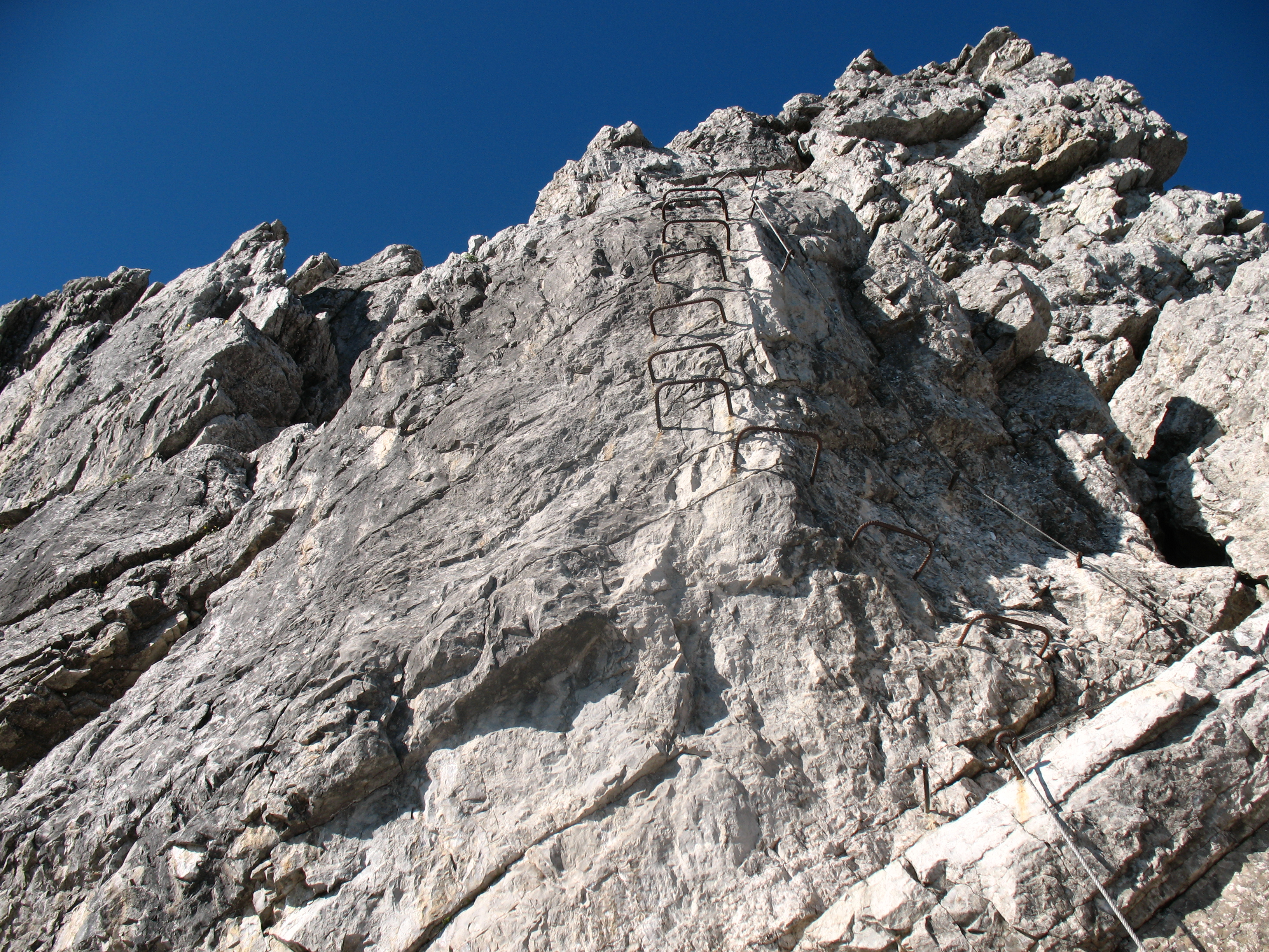 Passage des Mindelheimer Klettersteigs am Dritten Schafalpenkopf.